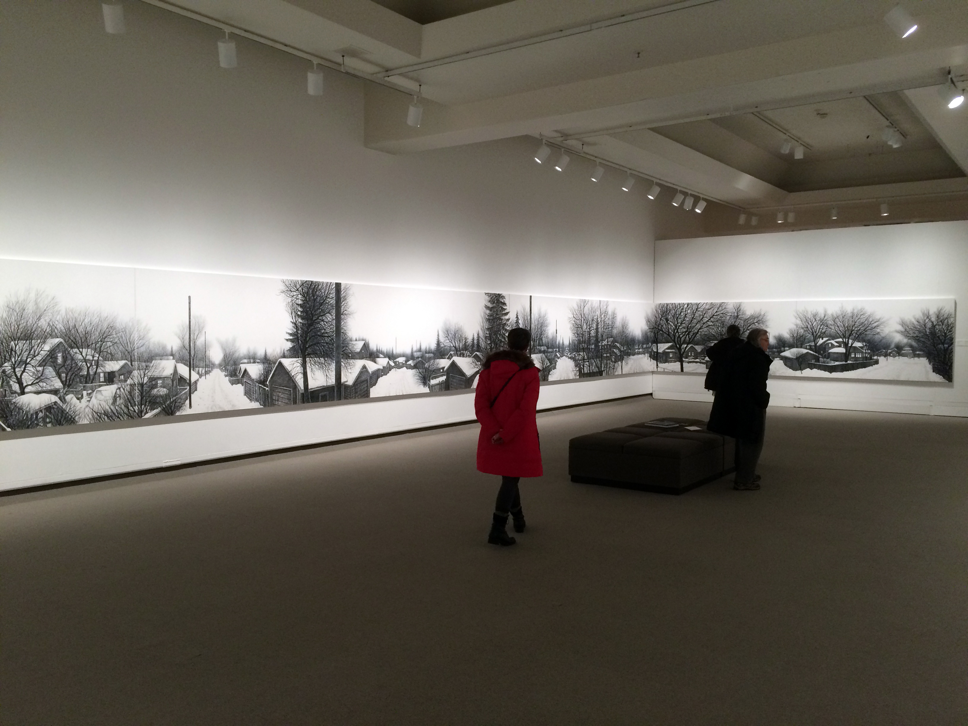 Wilf Perrault Mural